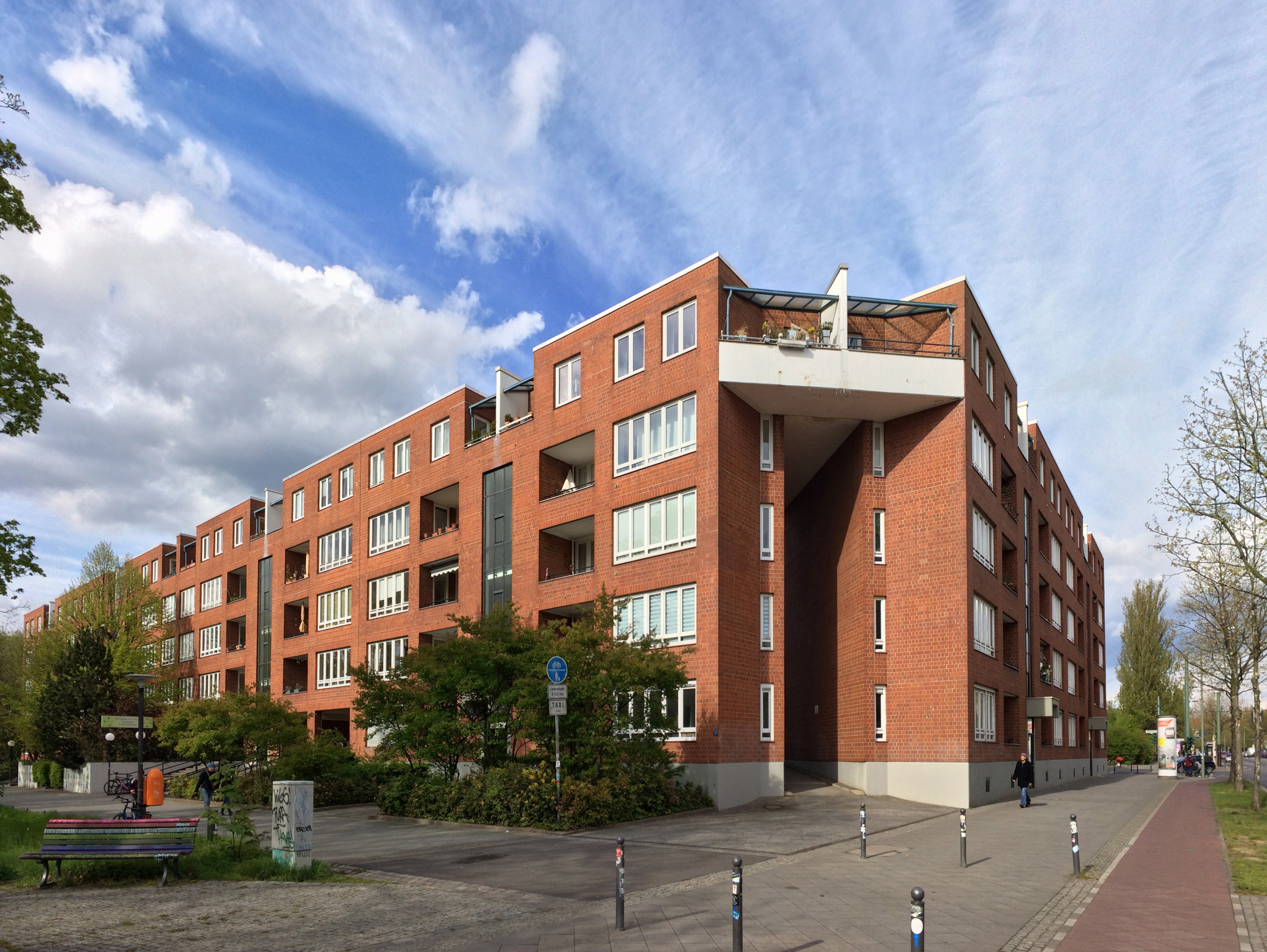 Wohnbebauung Vinetaplatz, Bernauer Straße, 1971–1978, Josef Paul Kleihues, Manfred Schonlau, Berlin-Wedding, Sanierungsgebiet Brunnenstraße, städtebaulicher Entwurf 1963–1966, Fritz Eggeling